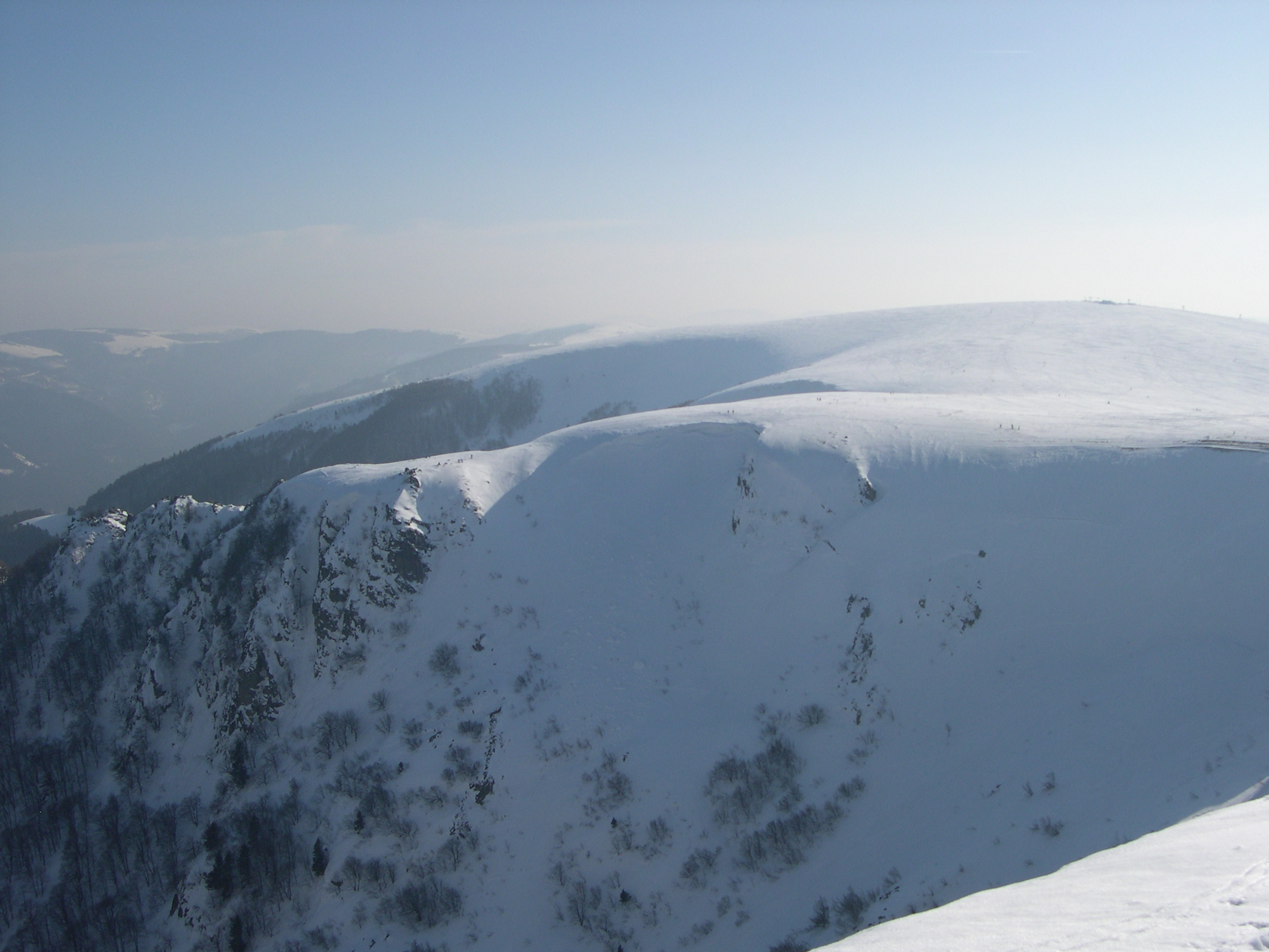 Combe du Wormspel et rochers du Spitzkoeple dans le massif du Hohneck. Massif des Vosges, 68 Alsace. A droite le Kastelberg.